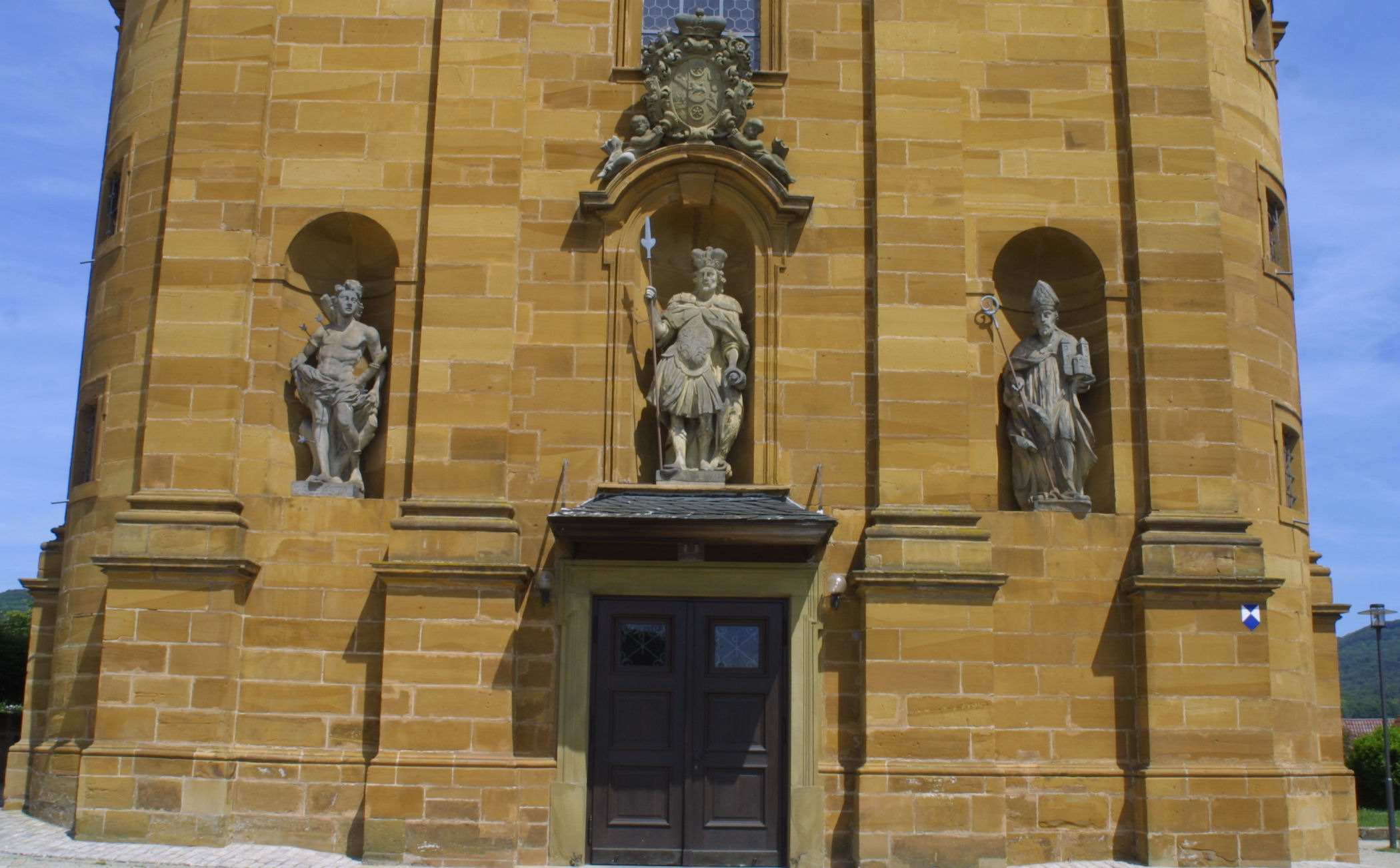 Sankt Wenzeslaus (Litzendorf)